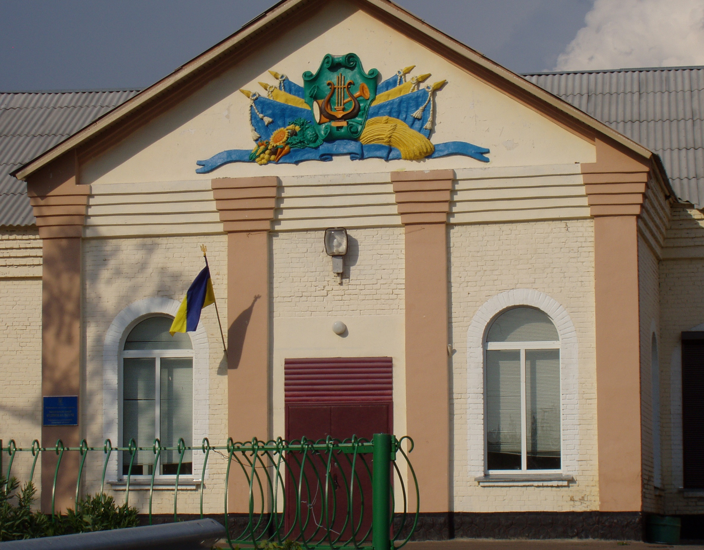 Будинок культури у с. Вишеньки Бориспільського району (Київська обл., Україна), вул. Леніна 87